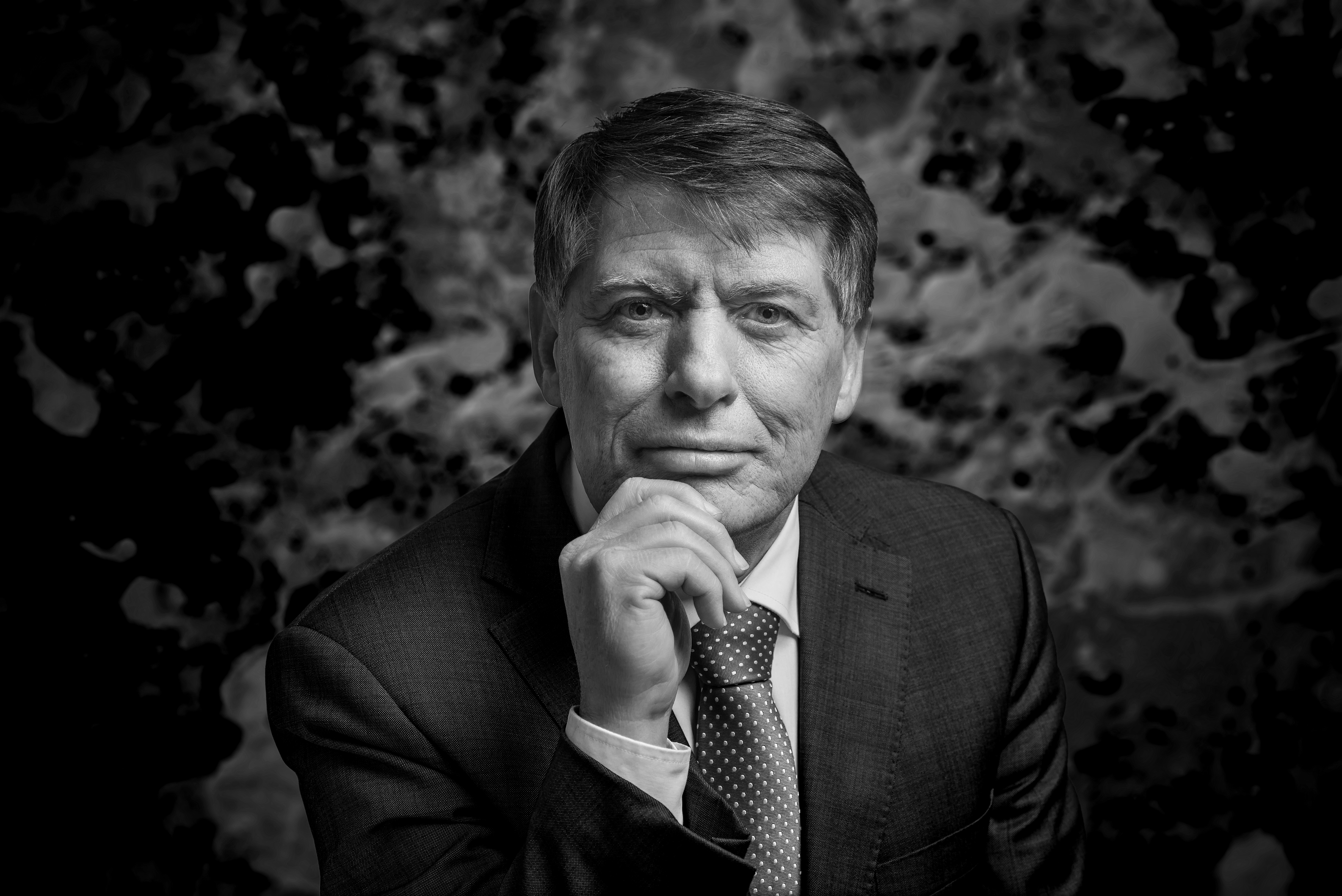 Sjaak van der Tak